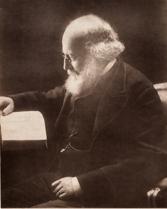 Major Evans Bell